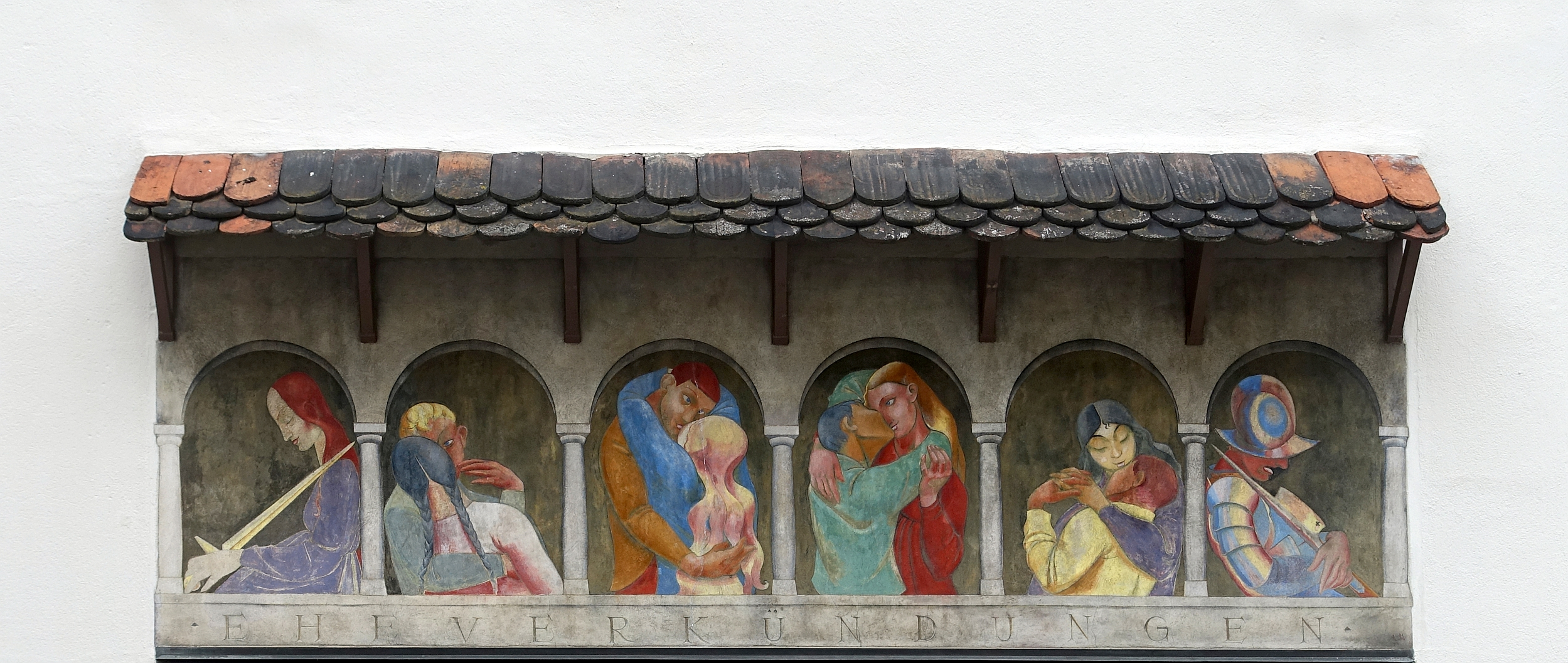 Wandbild Liebespaare von 1919–1920, von Niklaus Stöcklin (1896–1982) über den ehemaligen Aushängekästen des Zivilstandsamtes, in denen die bevorstehenden Heiraten publiziert wurden. Standort: Münsterplatz 14, Basel. Die Fresken lösten heftige Debatten aus und wurden in der Nacht vom 20. zum 21. August 1921 mit roter und blauer Anilinfarbe übergossen.